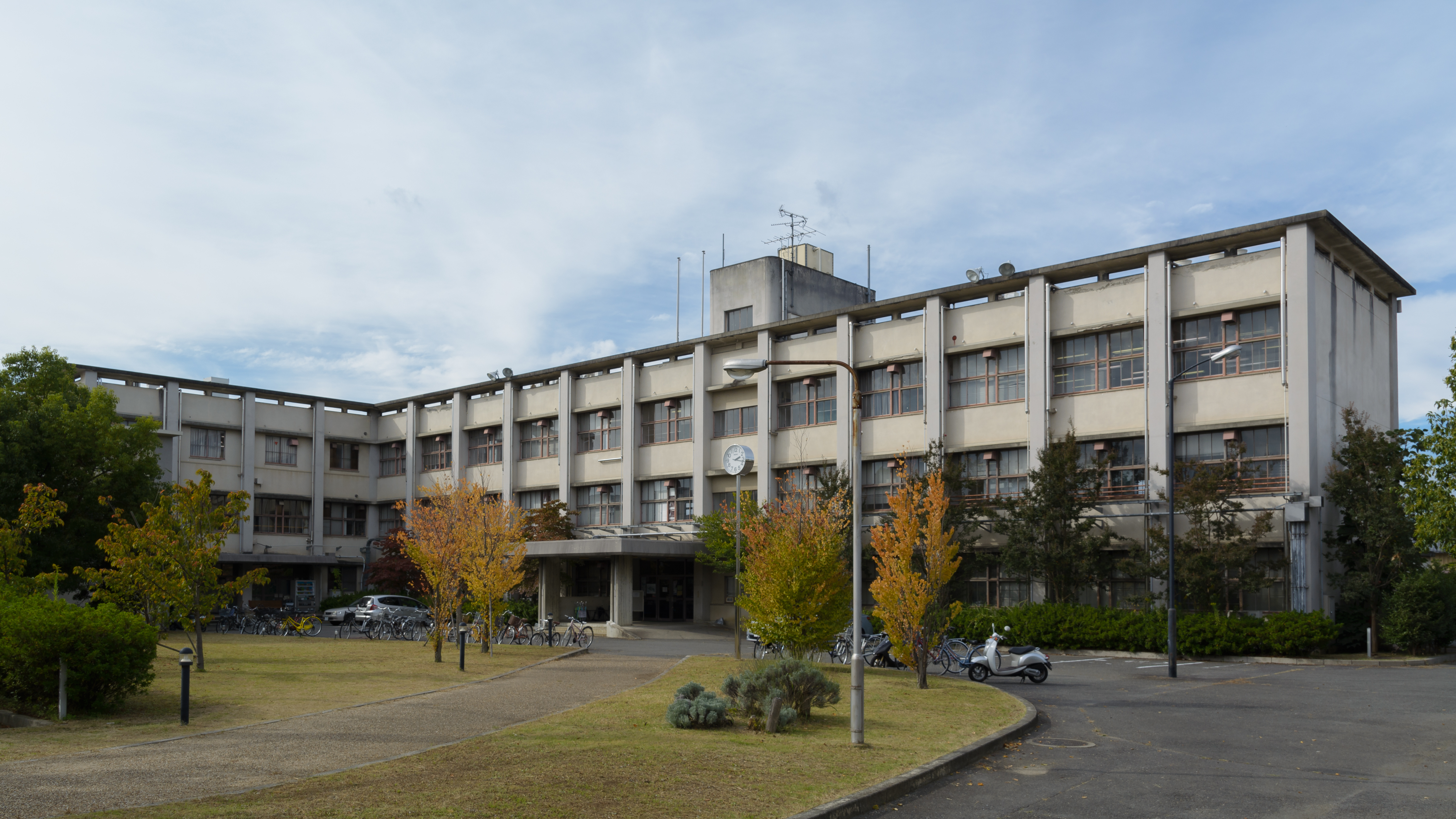 奈良県立大学（奈良市船橋町）